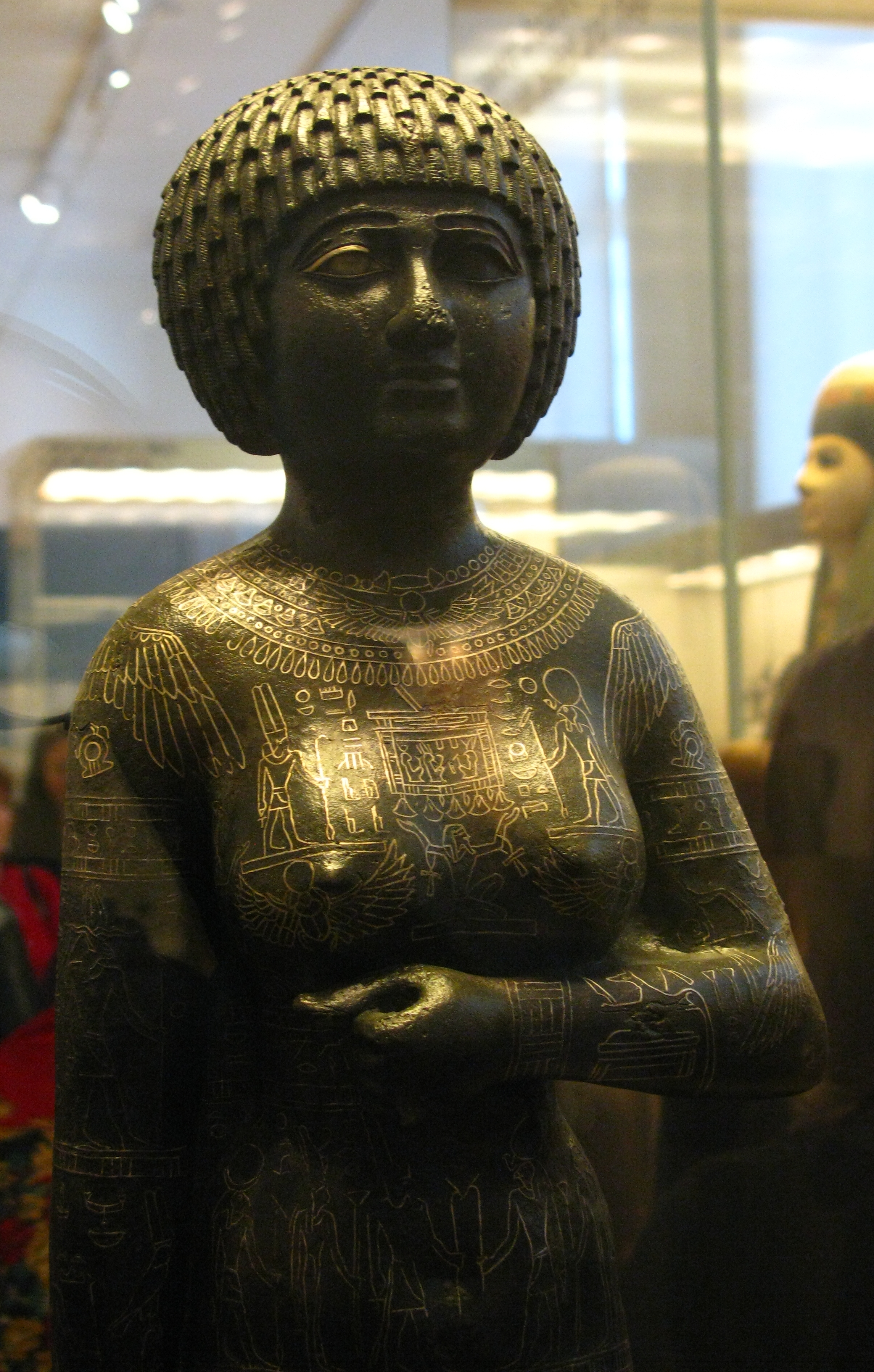 Statue of the princess - priestess Takushit Found on Kom Tourougka, near Lake Mareotis, south of Alexandria, in 1880. Copper alloy with precious metal inlay. End of 25th Dynasty, approximately 670 BC. The woman's name means 'the Ethiopian' and may refer to her relation or marriage to an Ethiopian. Her father was Akanosh II, great chief of the Ma tribe from Libya. The figure's characteristic garment is executed with inlaid decoration, a technique in which the engraved design is inlaid with precious metal wire. The motifs are hieroglyphs and deities of the northeast region of the Nile Delta, Takushit's homeland. The statue had a ritual votive, and funerary use. Egyptian Artifacts. National Archaeological Museum, Athens, Greece --- Άγαλμα της πριγκίπισσας - ιέρειας Τακουσίτ Βρέθηκε το 1880 στο Κομ Τουρουγκά, κοντά στη λίμνη Μαρεώτιδα, νότια της Αλεξάνδρειας. Κράμα χαλκού με ενθέσεις πολύτιμου μετάλλου. Τέλος 25ης Δυναστείας, γύρω στο 670 π.Χ. Το όνομά της σημαίνει "η Αιθιοπίς" και πιθανόν παραπέμπει σε συγγενικό δεσμό ή γάμο με Αιθίοπα. Πατέρας της ήταν ο Ακανός Β', μεγάλος αρχηγός της φυλής των Μα από τη Λιβύη. Χαρακτηριστικό του αγάλματος είναι το ένδυμα. Διακοσμείται με ένθετα σύρματα πολύτιμου μετάλλου στα εγχάρακτα σχέδια ιερογλυφικών και θεοτήτων της Β.Α. περιοχής του Δέλτα, πατρίδας της Τακουσίτ. Η χρήση του αγάλματος ήταν τελετουργική, αναθηματική και ταφική. Εθνικό Αρχαιολογικό Μουσείο. Αθήνα.